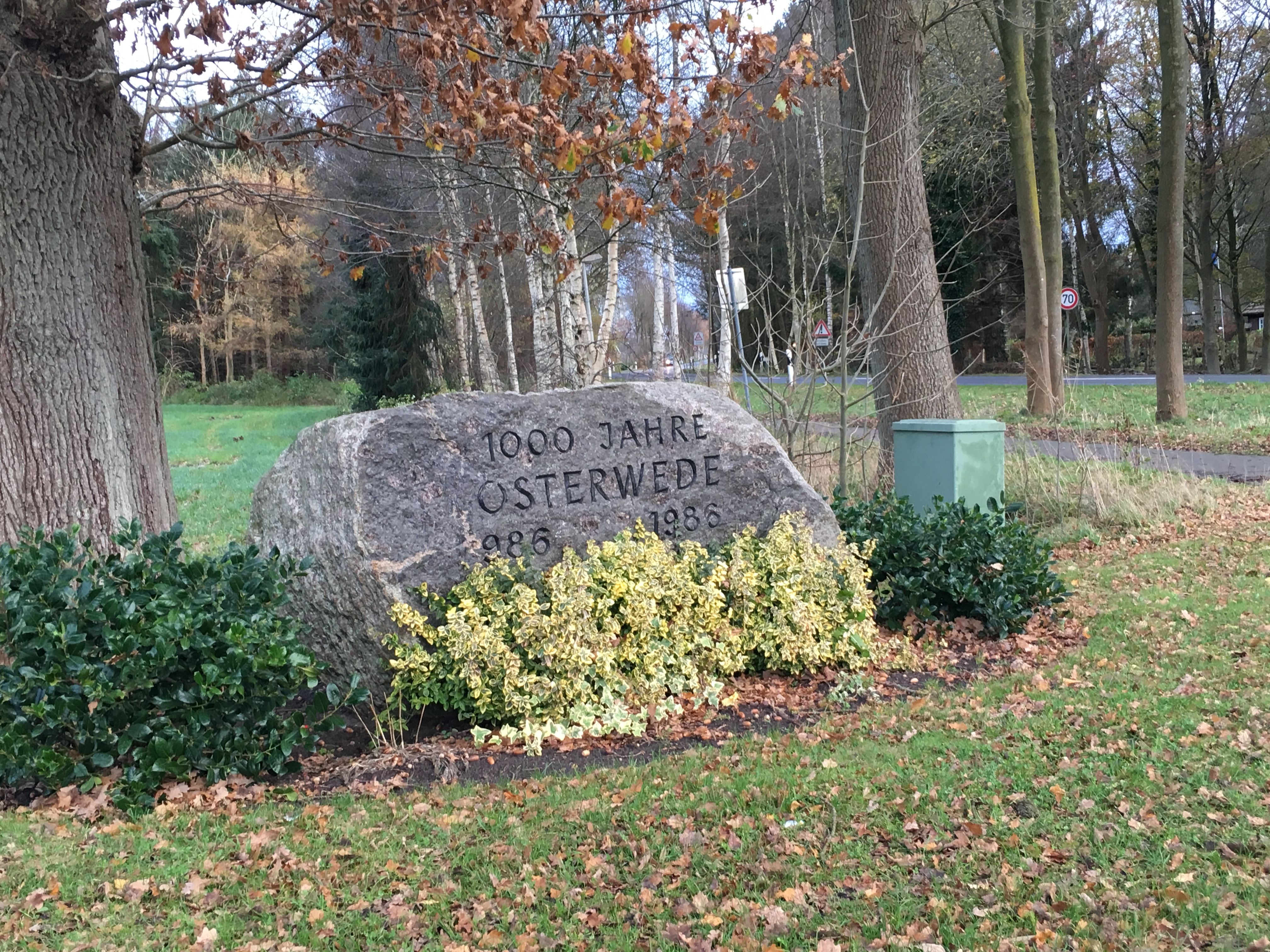 Gedenksteen 1000 Johr Oosterweed